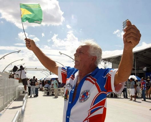 Carnaval São Paulo 2010. Movimentação antes da apuração das escolas de samba do Grupo Especial, hoje, no sambódromo do Anhembi em São Paulo, SP. Na Foto: O presidente da Pérola Negra, Edilson Casal. Fotógrafo: Léo Pinheiro.